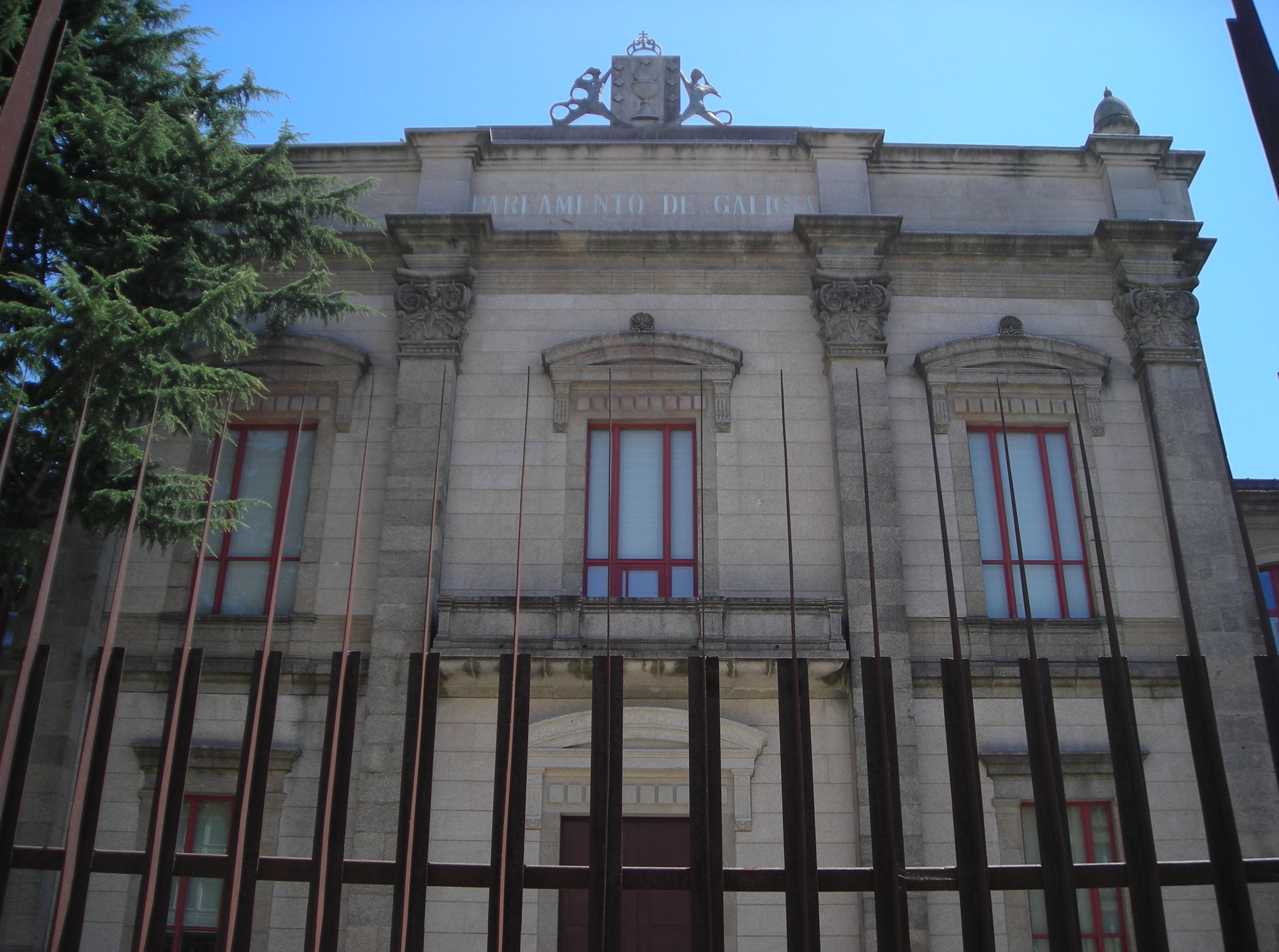 Sede do parlamento de Galicia, en Compostela.